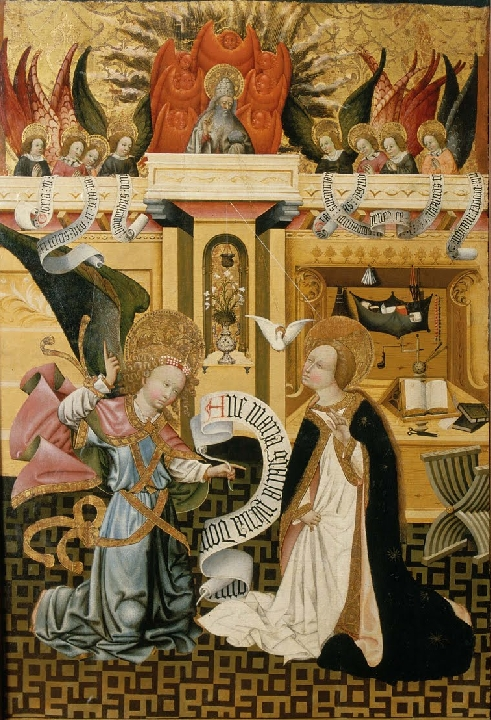 Taula de l'Anunciació